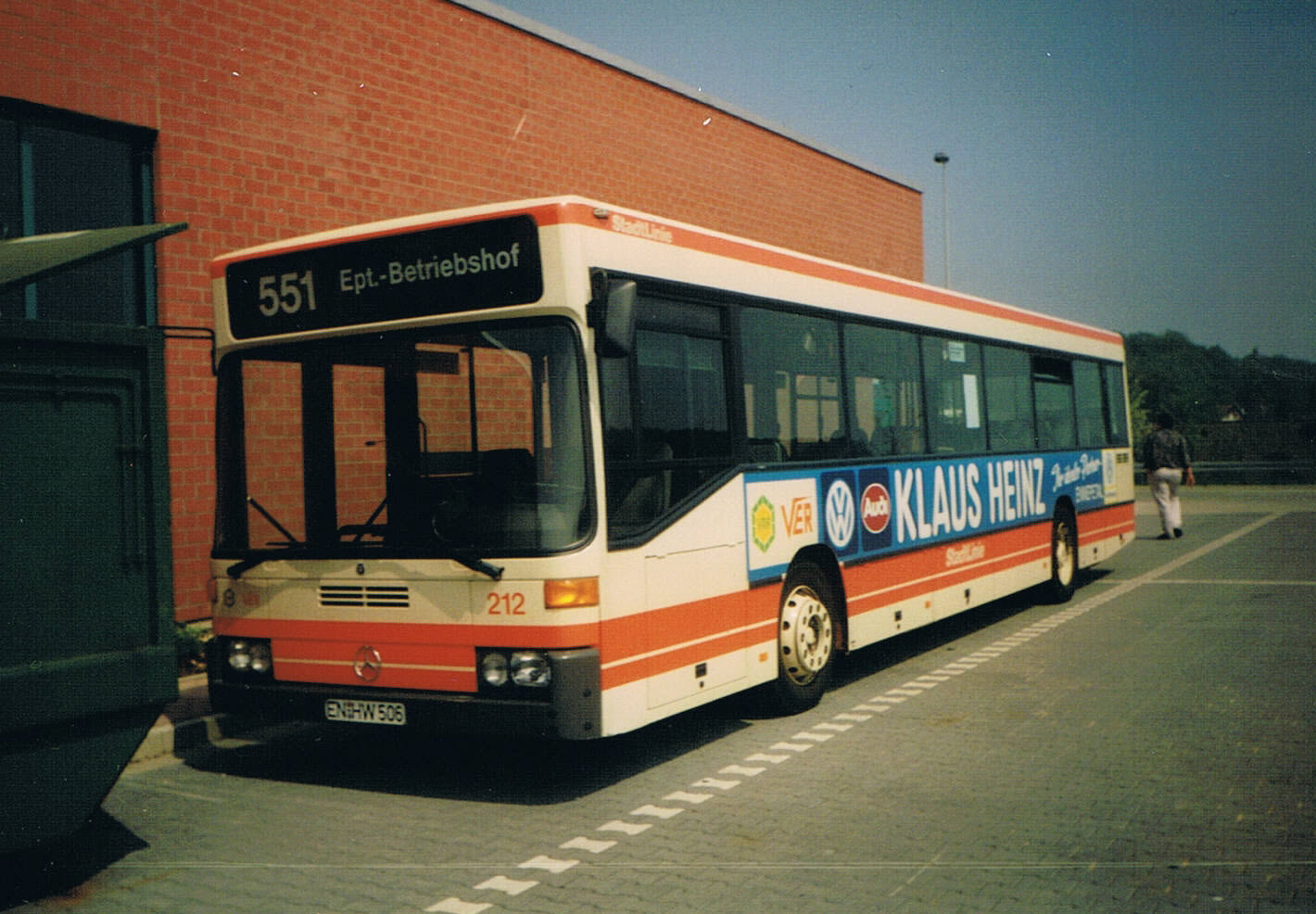 Tag der offenen Tür im VER-Betriebshof in Ennepetal-Milspe am 6. Mai 1995